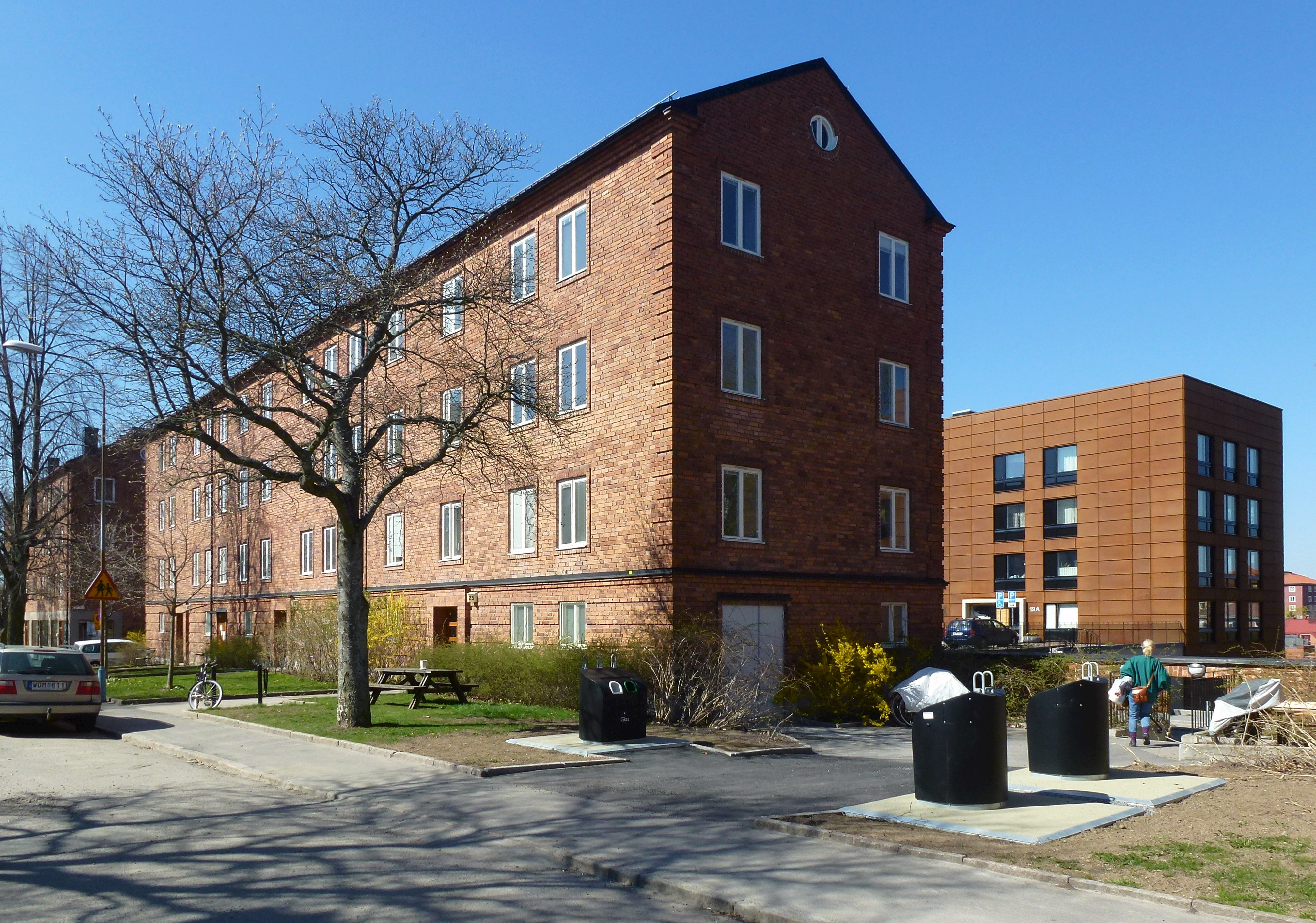 Barnrikehusen vid Främlingsvägen i Midsommarkransen, arkitekt Ernst Hawerman och Nils G:son Friberg